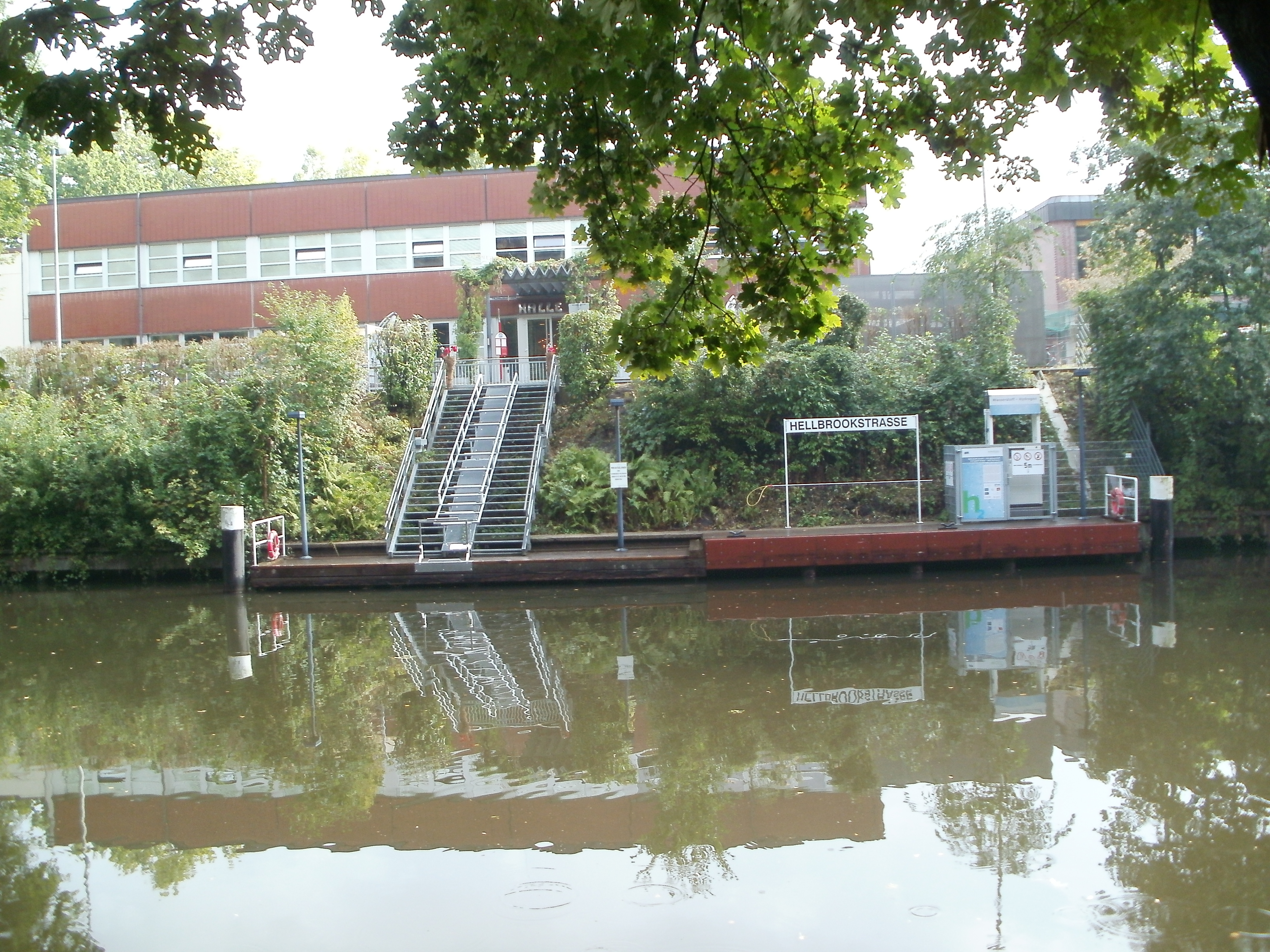 Wasserstofftankstelle Hellbrookstrasse am Barmbeker Stichkanal in Hamburg zur Auftankung des Alsterschiffes "Alsterwasser".